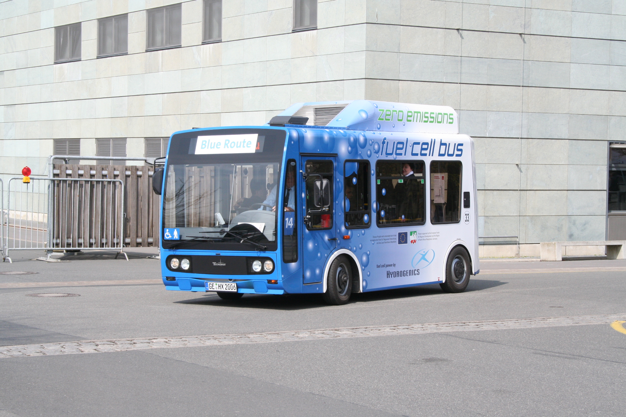 Tecnobus fuel cell bus.